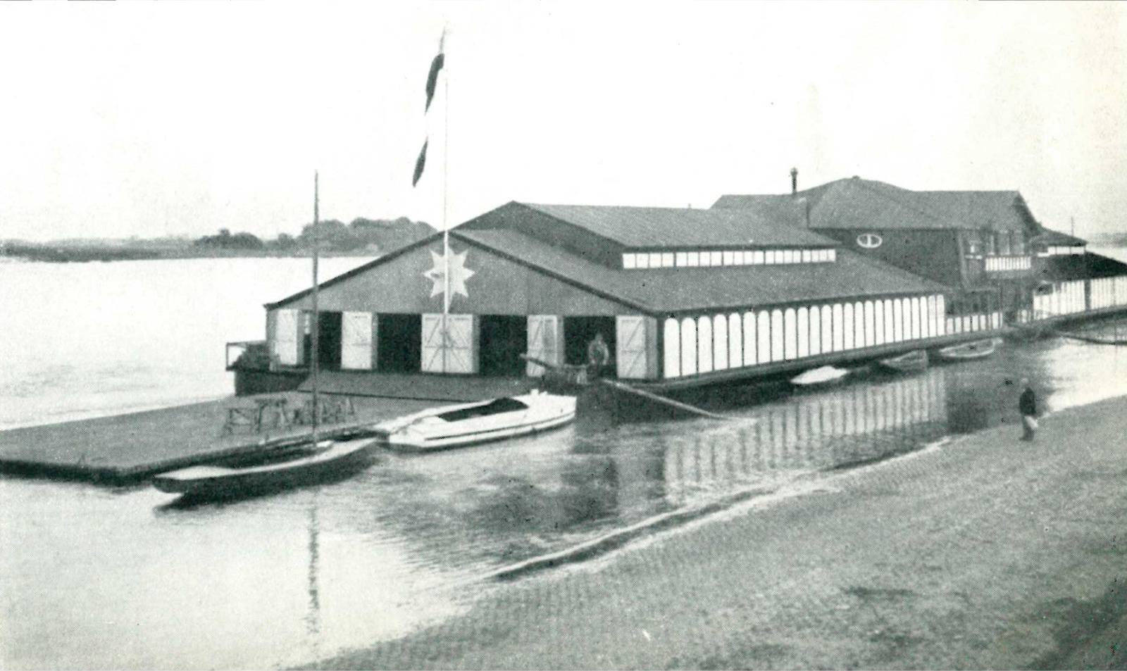 Blick auf das letzte schwimmende Bootshaus der Kölner Rudergesellschaft 1891 am Rheinufer in Köln.